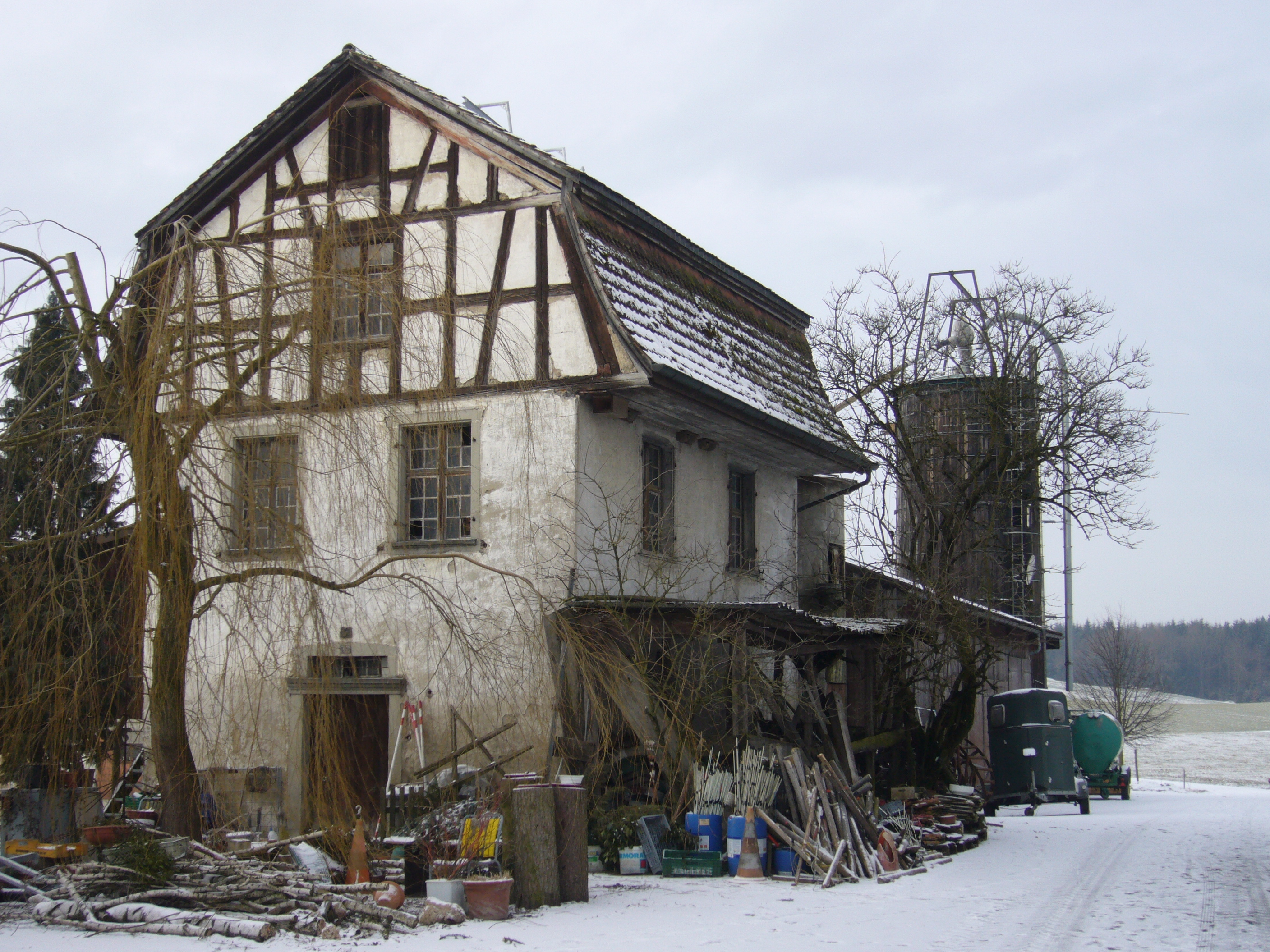 Nebengebäude zum Bläsihof.